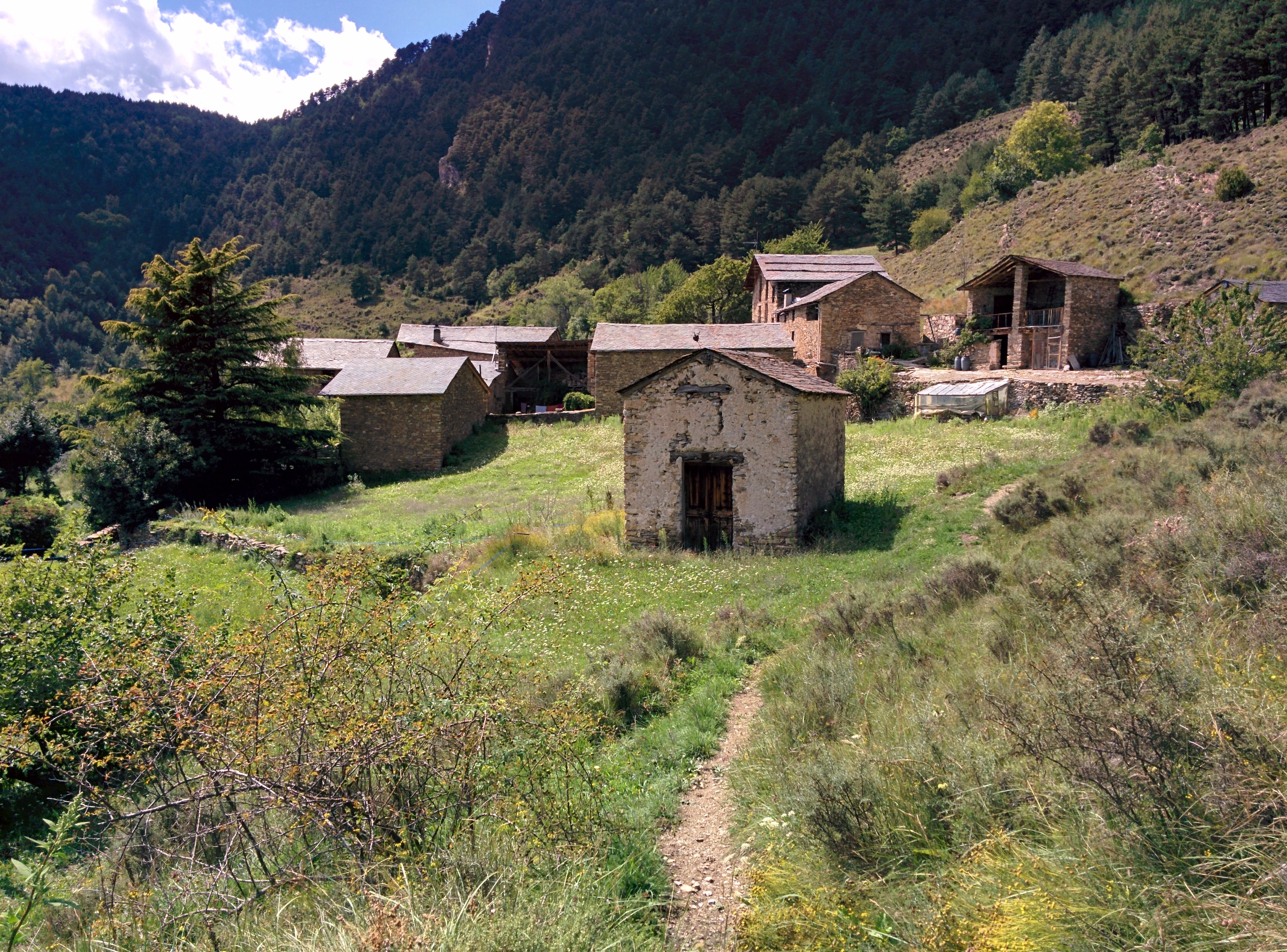 Capella de la Mare de Déu de la Soledat (les Valls de Valira)